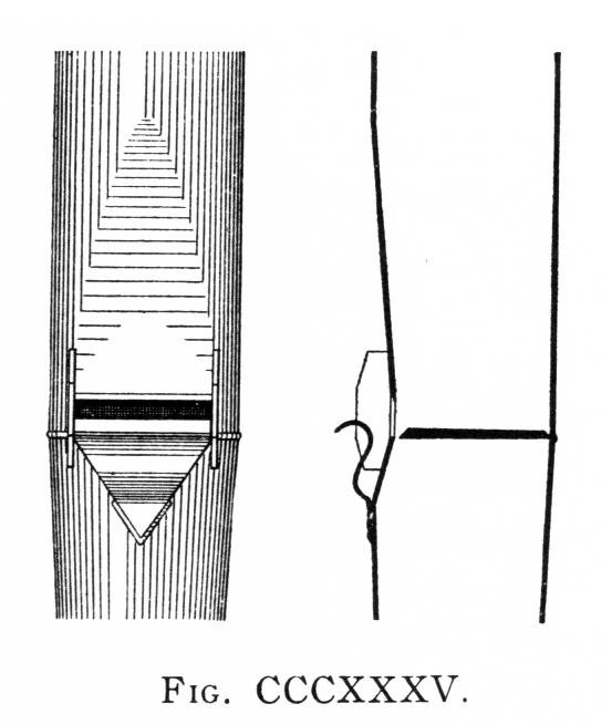 Salicional - orgonaregiszter